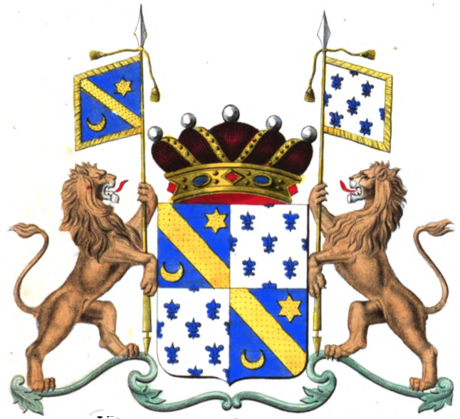 Armoiries de la famille Benoist de Gentissart